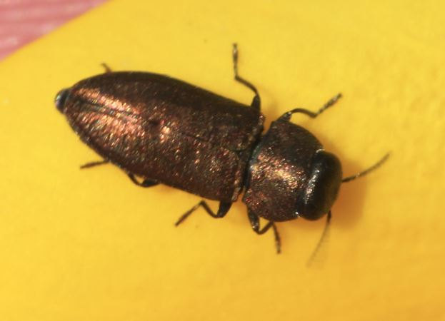 Mendizabals Eckschild-Prachtkäfer (Anthaxia mendizabali) am 25. Mai 2019 in der Schwetzinger Hardt